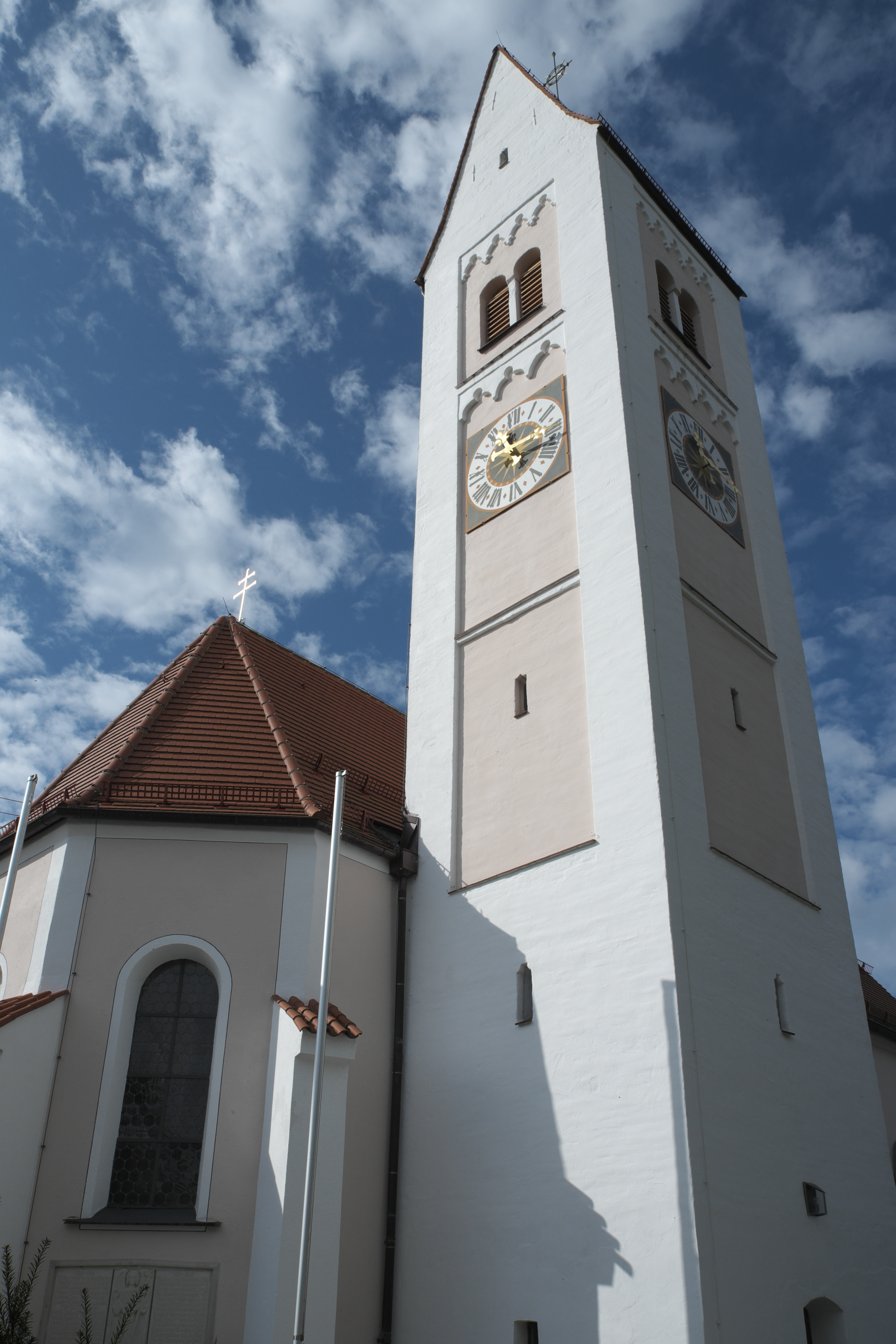 Katholische Pfarrkirche St. Rupert in Oberdießen (Unterdießen) im Landkreis Landsberg am Lech (Bayern/Deutschland)